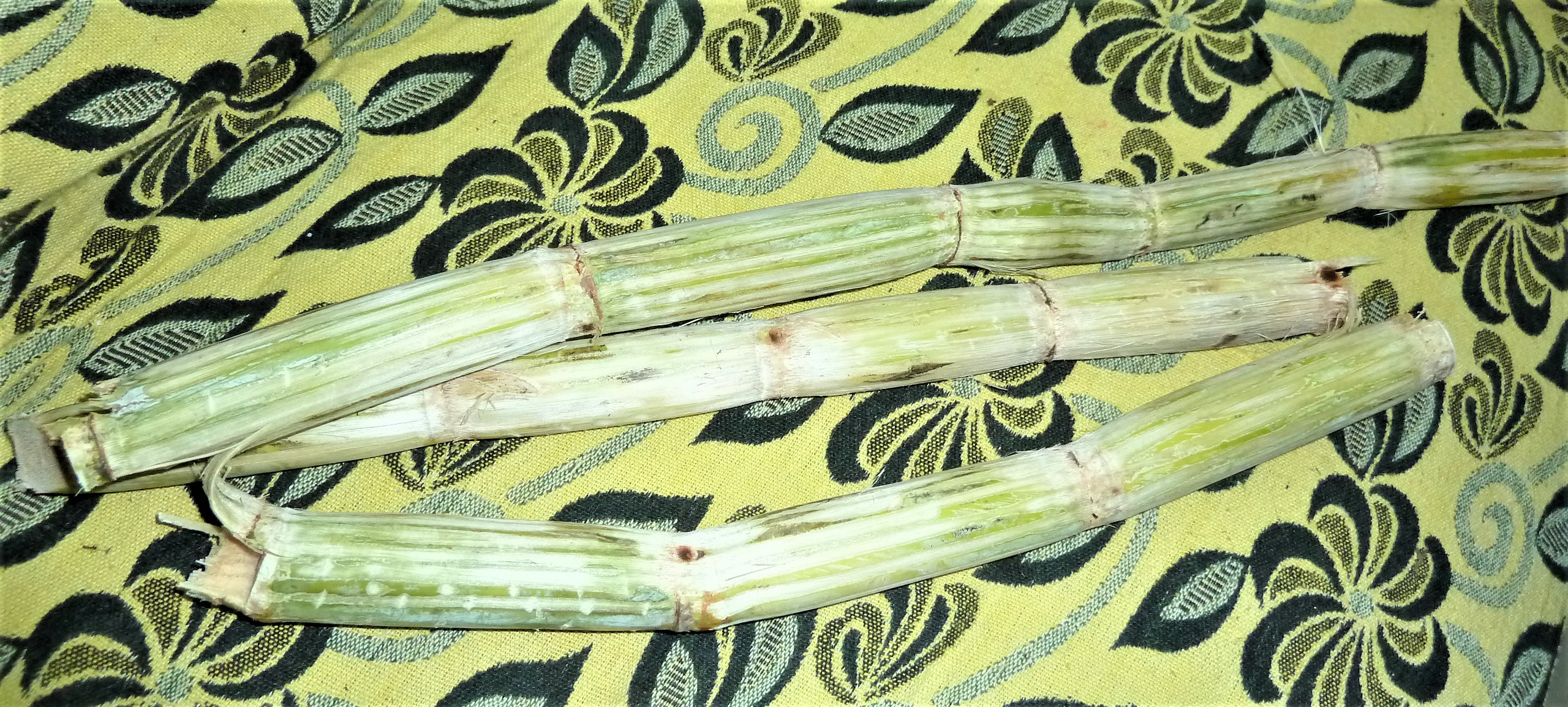 చెరకు ముక్కలు